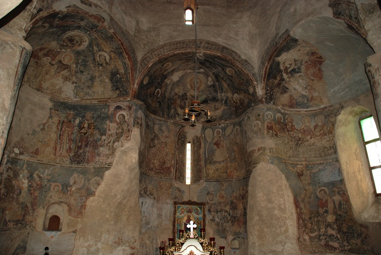 Горянська ротонда (внутрішнє убранство) - шестикутна споруда, стіни якої прикрашають старовинні фрески із зображеннями святих. Для участі фотографії в конкурсі необхідно виправити ID у відповідності до вказаного у конкурсних списках